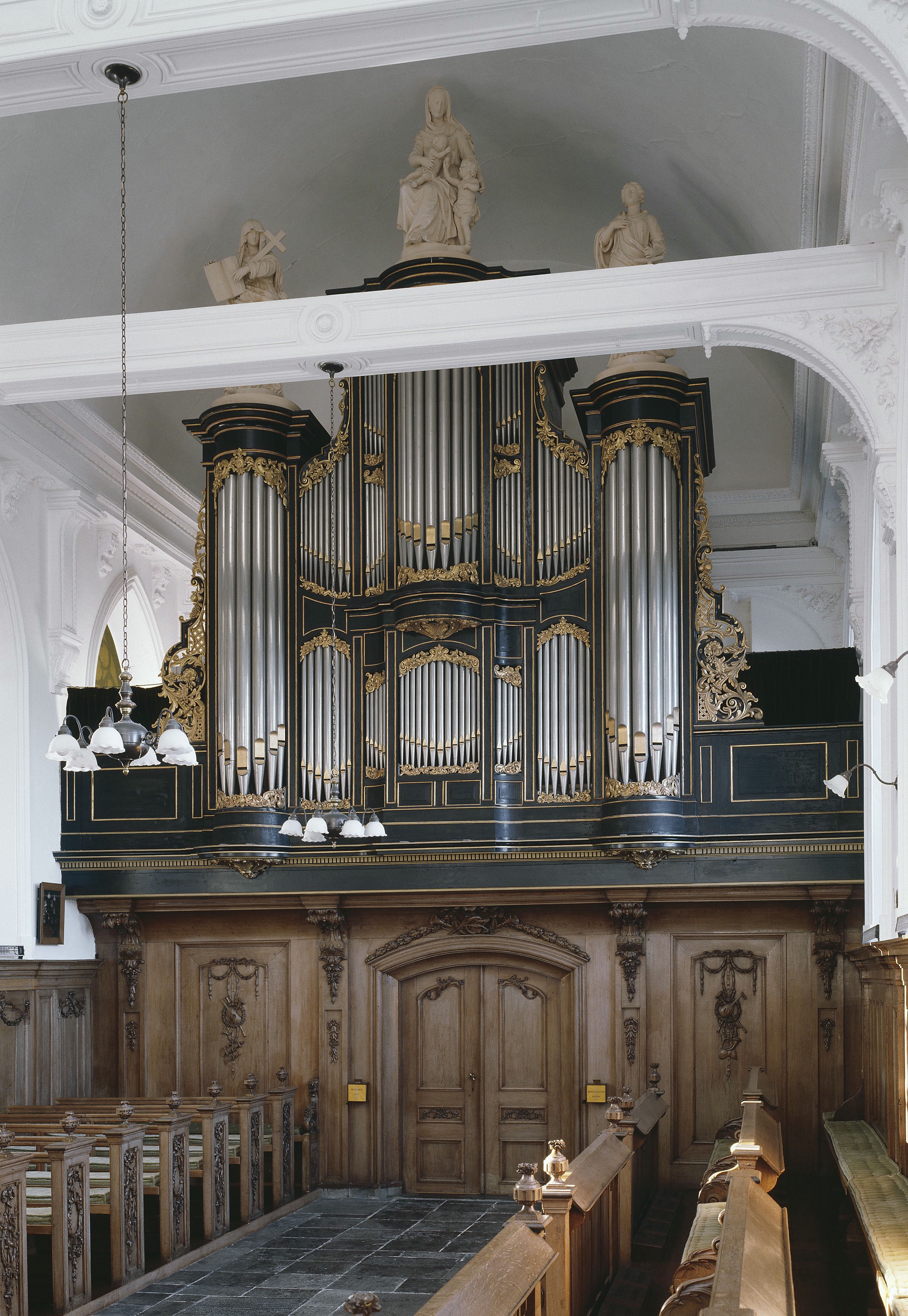 Nederlands Hervormde Kerk: Interieur, aanzicht orgel, orgelnummer 937 (opmerking: Gefotografeerd voor Het Historische Orgel in Nederland 1878-1886, Bladzijde 81)